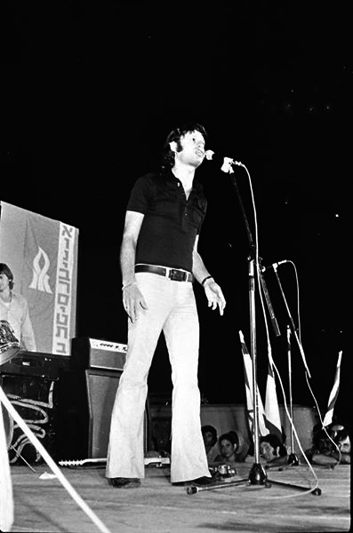 גדי יגיל בהופעה באוניברסיטת בן גוריון ביום הסטודנט